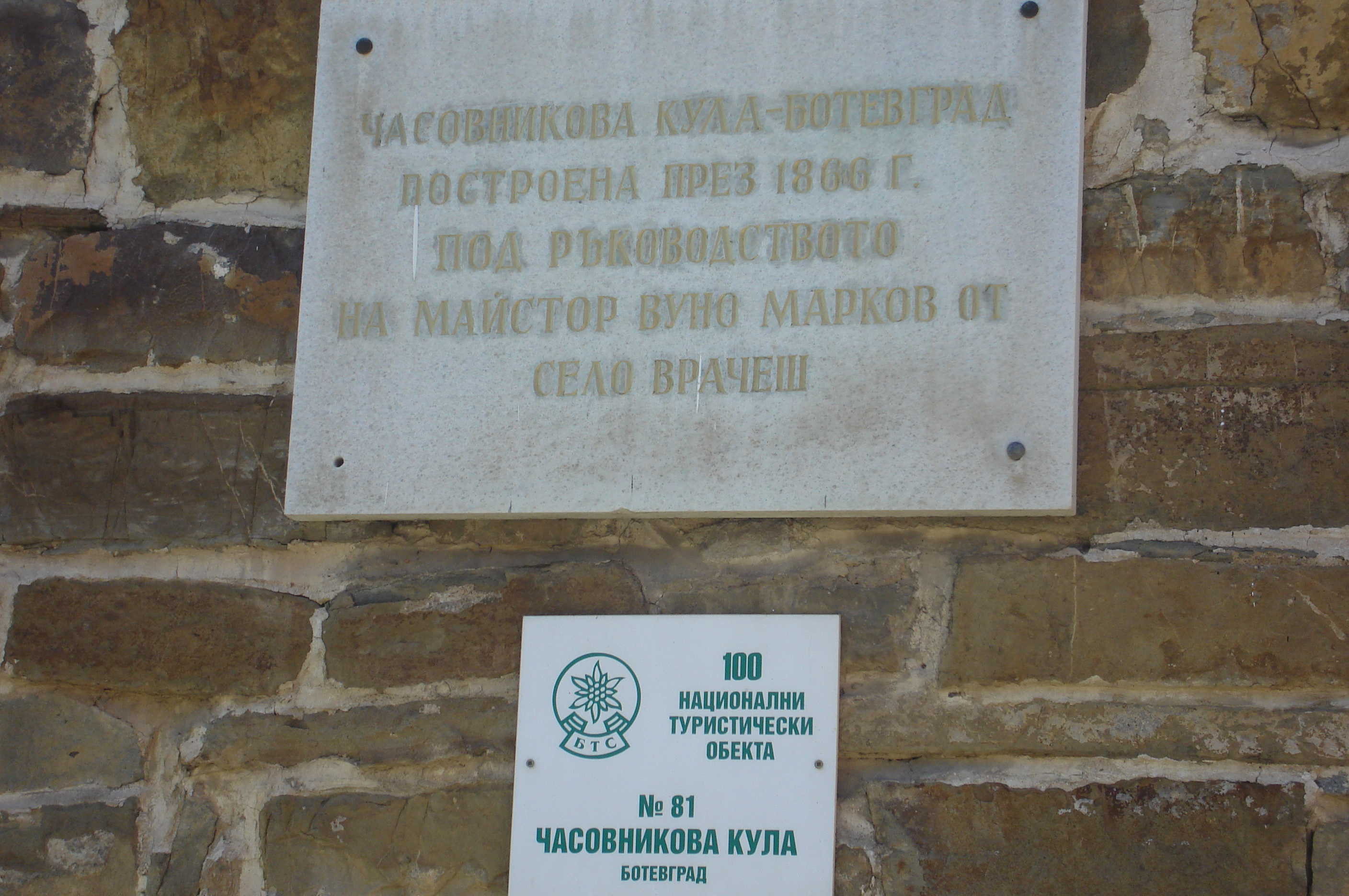 Часовниковата кула в Ботевград